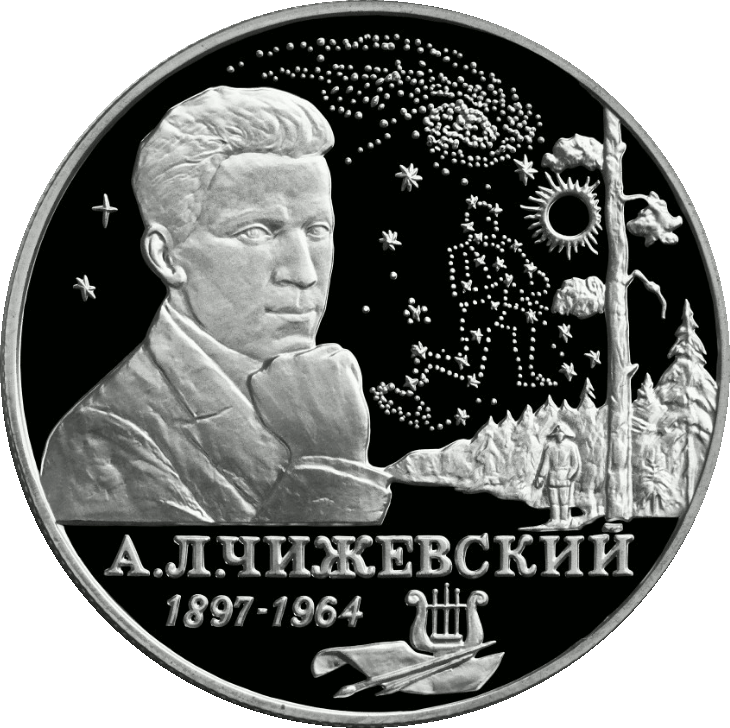 Монета Банка России — Серия: «Выдающиеся личности России», 100-летие со дня рождения А.Л. Чижевского, 2 рубля, реверс.